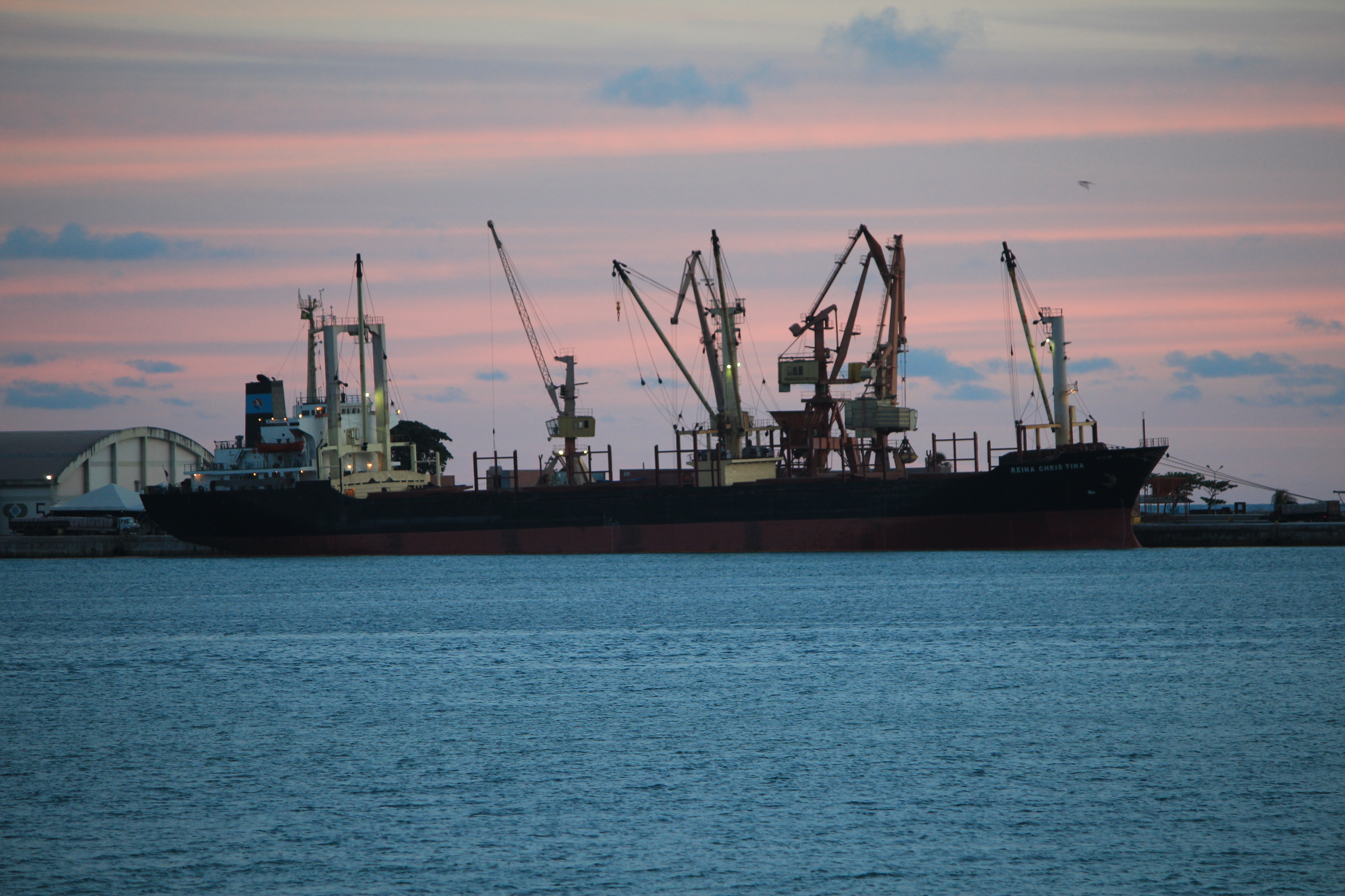 Atracações em Maceió